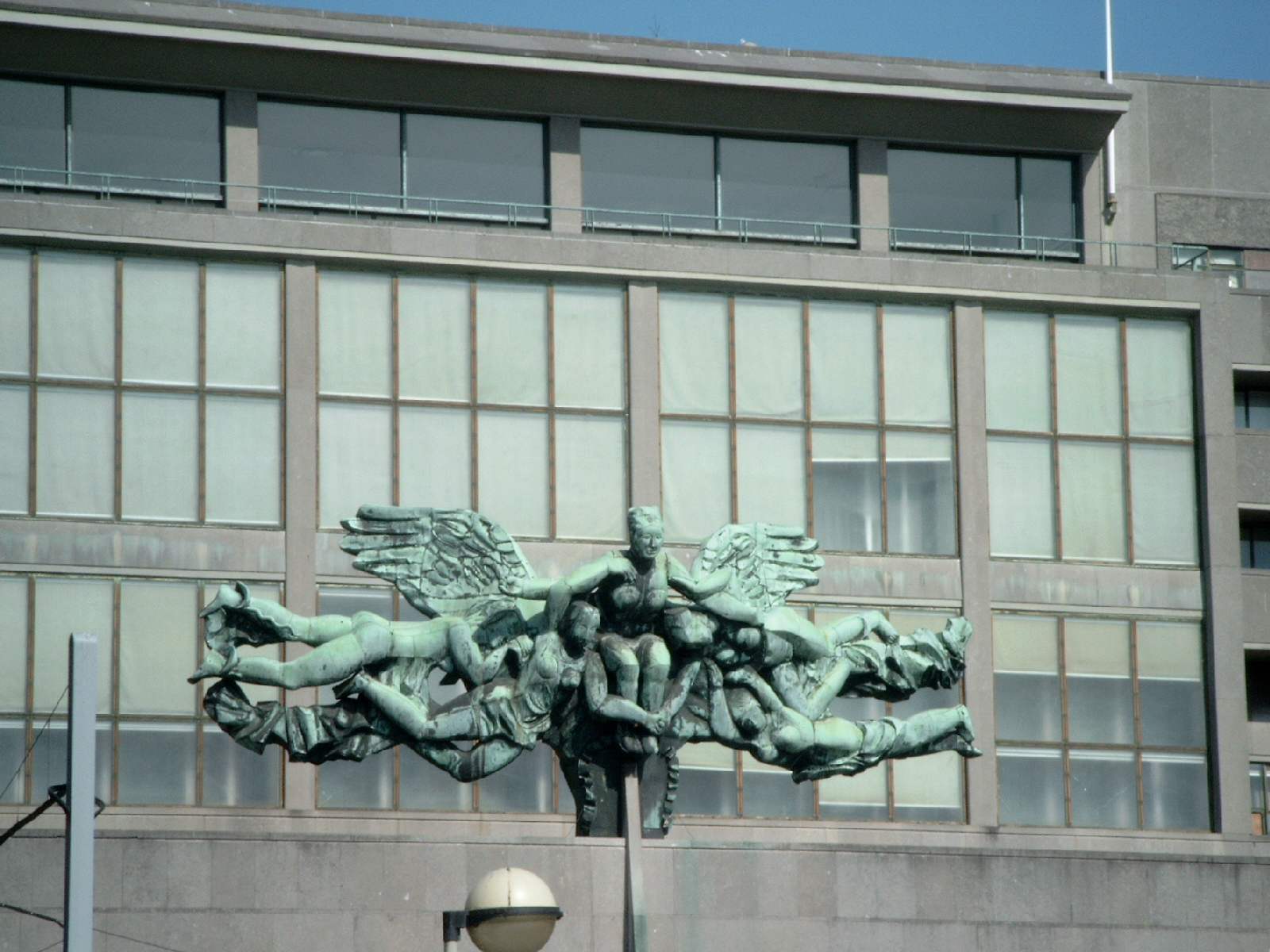 Jozef Cantré, beeldhouwwerk voor postgebouw Oostende, 1953